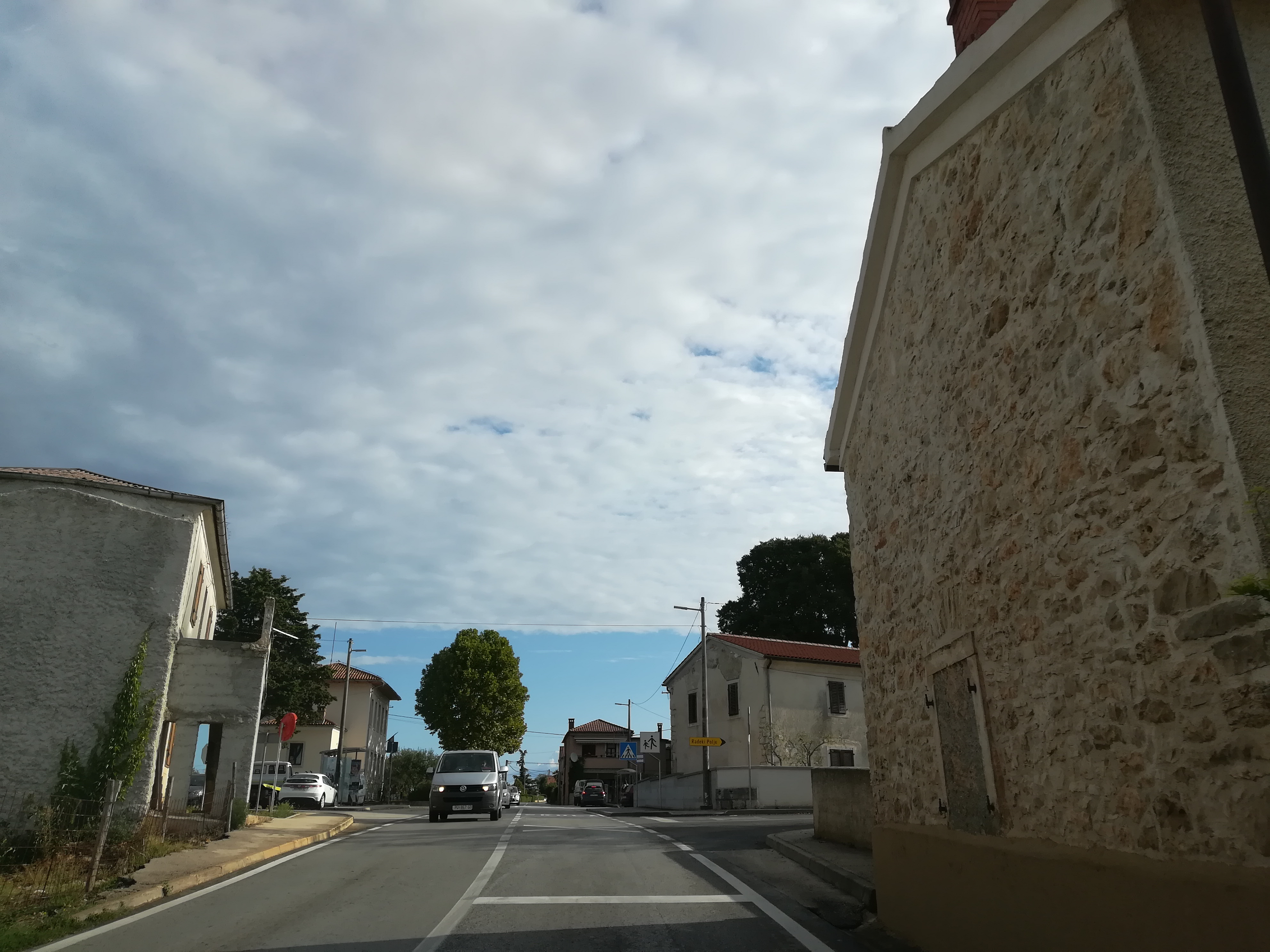 Loborika (Lavarigo) - Marzana